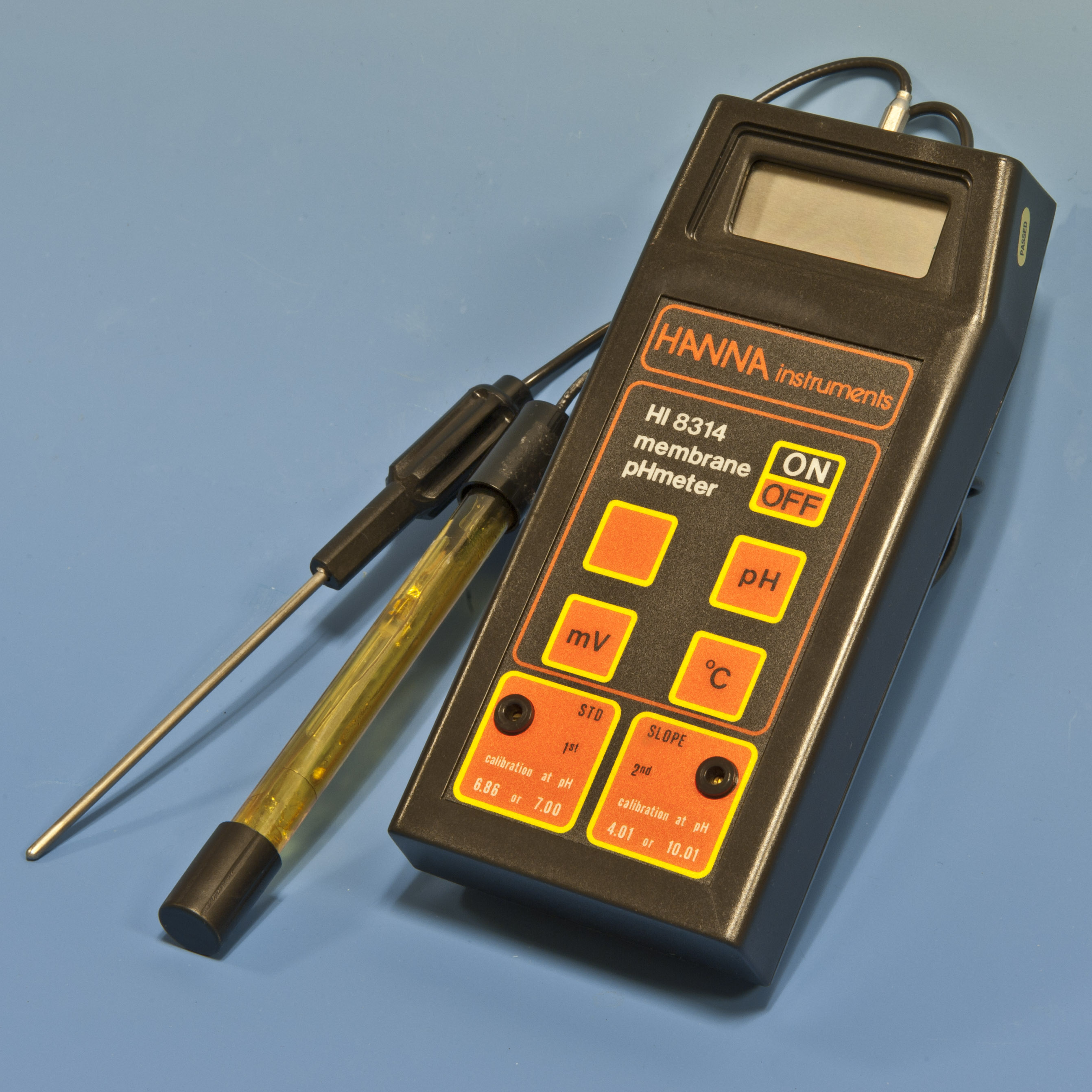 Ph meter (Hanna)